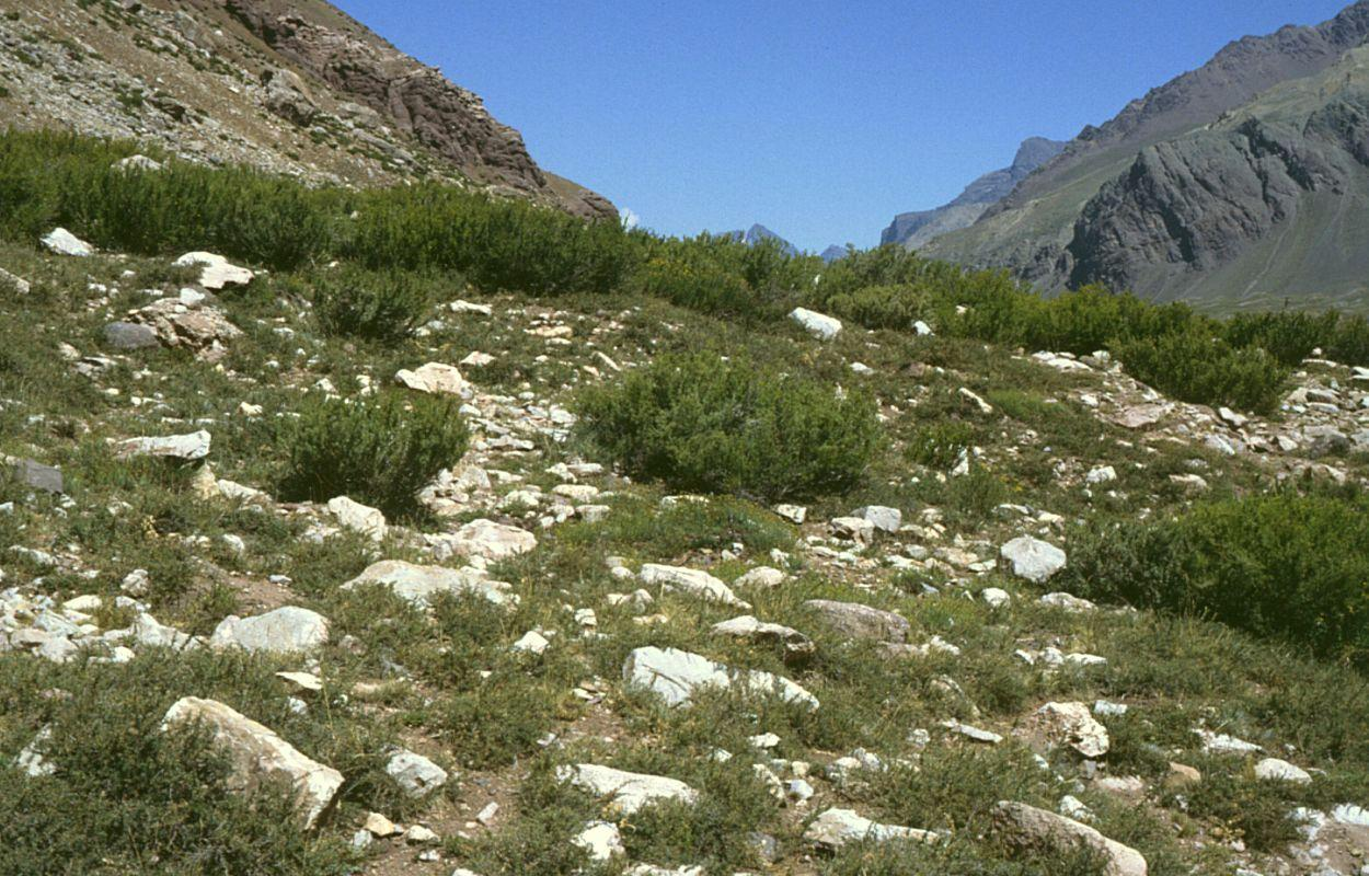 Adesmia pinifolia, Hülsenfrüchtler (Fabaceae), Schmetterlingsblütler (Faboideae) - Argentinien/Argentina, Paso de Uspallata, Puente del Inca, ca. 2700 m s.m. (Prov. Mendoza)